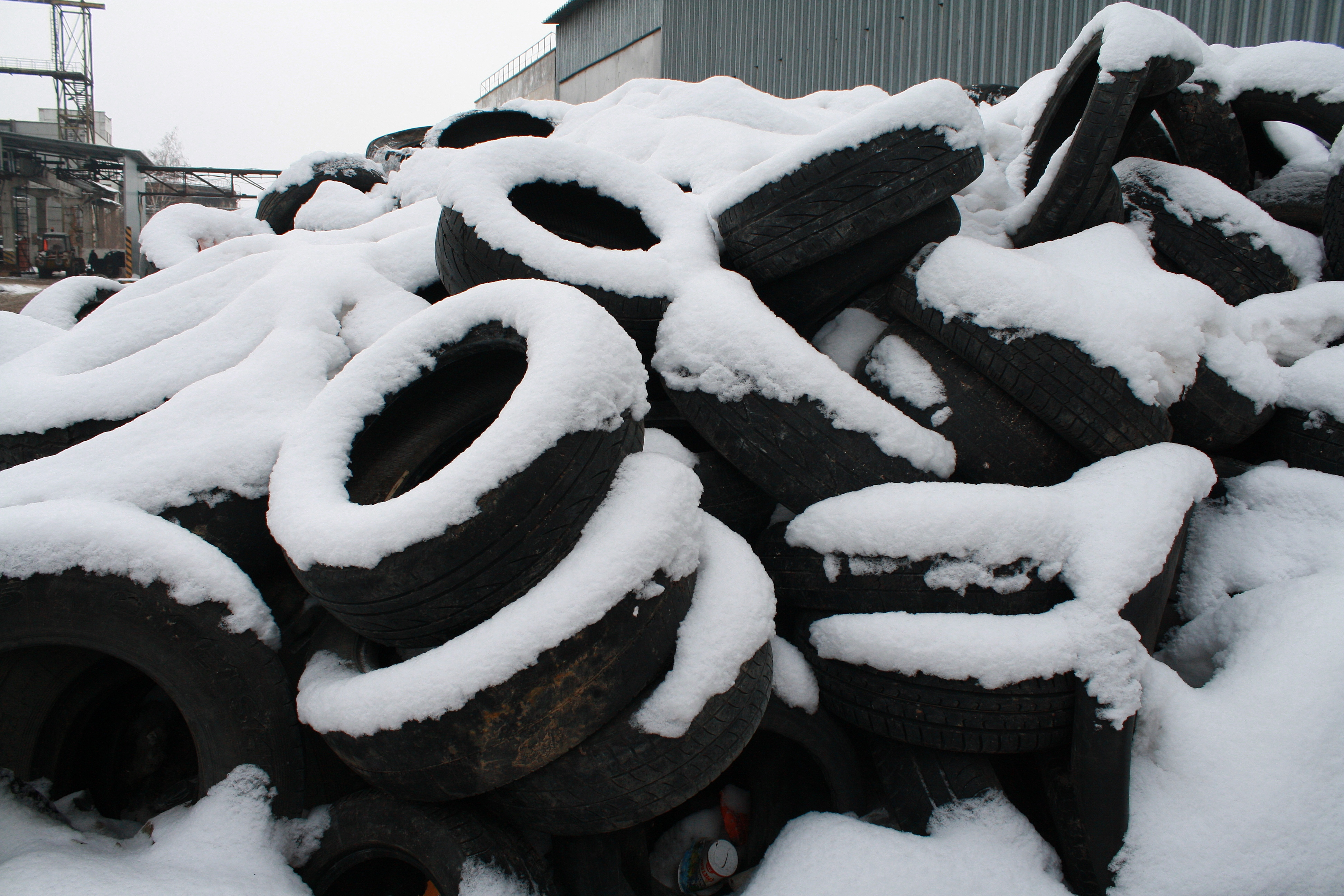 Гора старых автомобильных покрышек